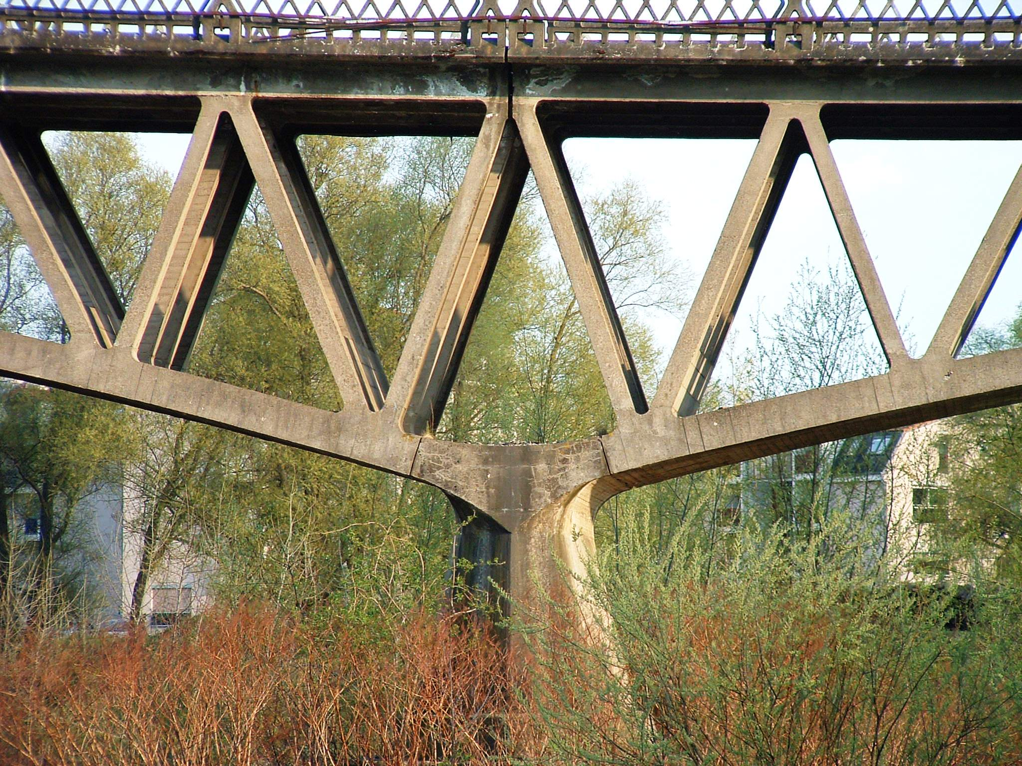 Pnt de Boutiron - Légèreté de la structure